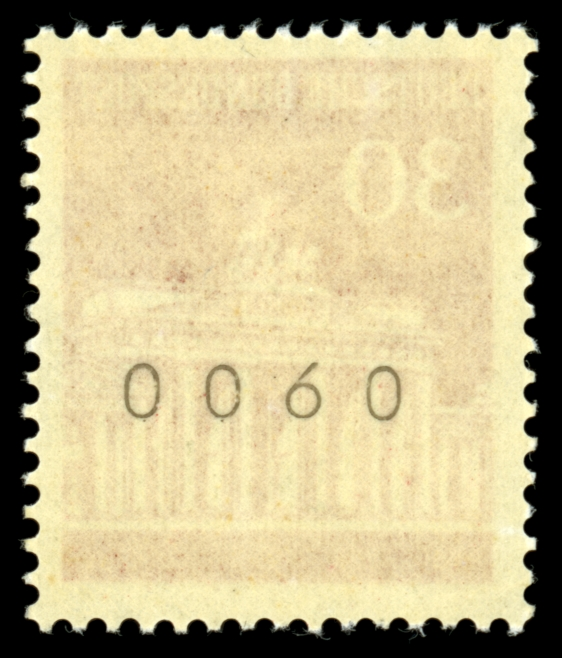 Information: Ausgabepreis: Pfennig First Day of Issue / Erstausgabetag: Auflage: Entwurf: Druckverfahren: Michel-Katalog-Nr: Ländercode-MiNr